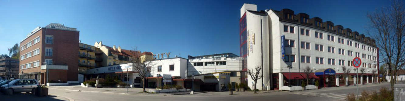 Bryggerigården ligger ved Søndre torv i Hønefoss. Til høyre Hotell Ringerike.